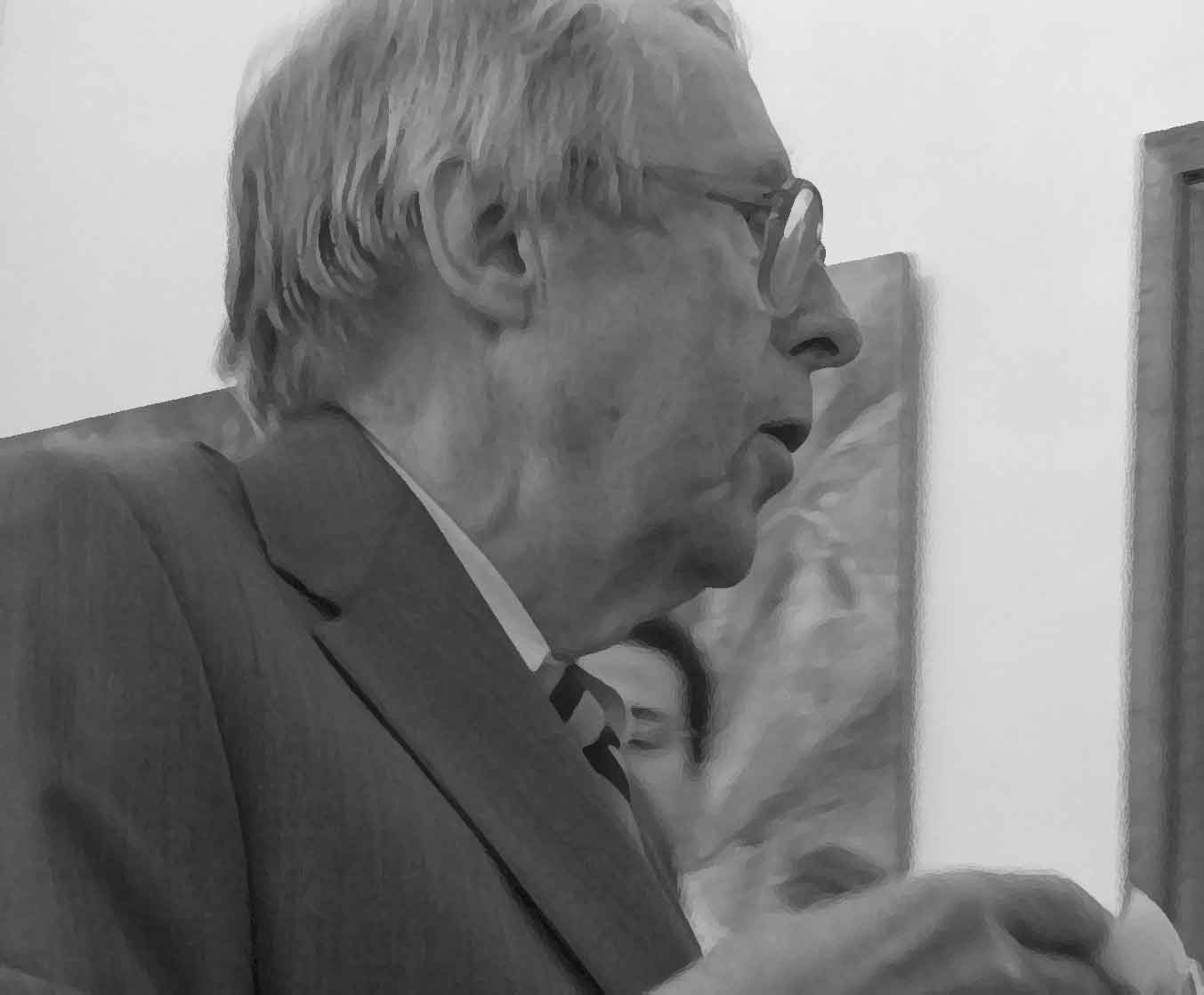 Jaakko Hintikka after a conference